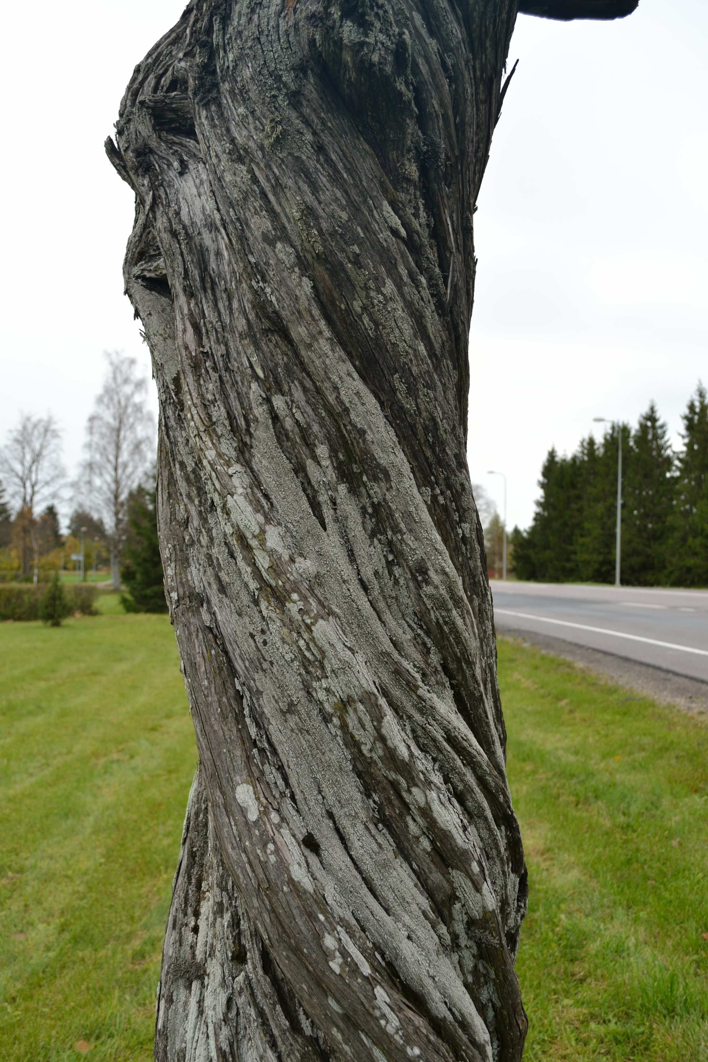 Kernu kadakas